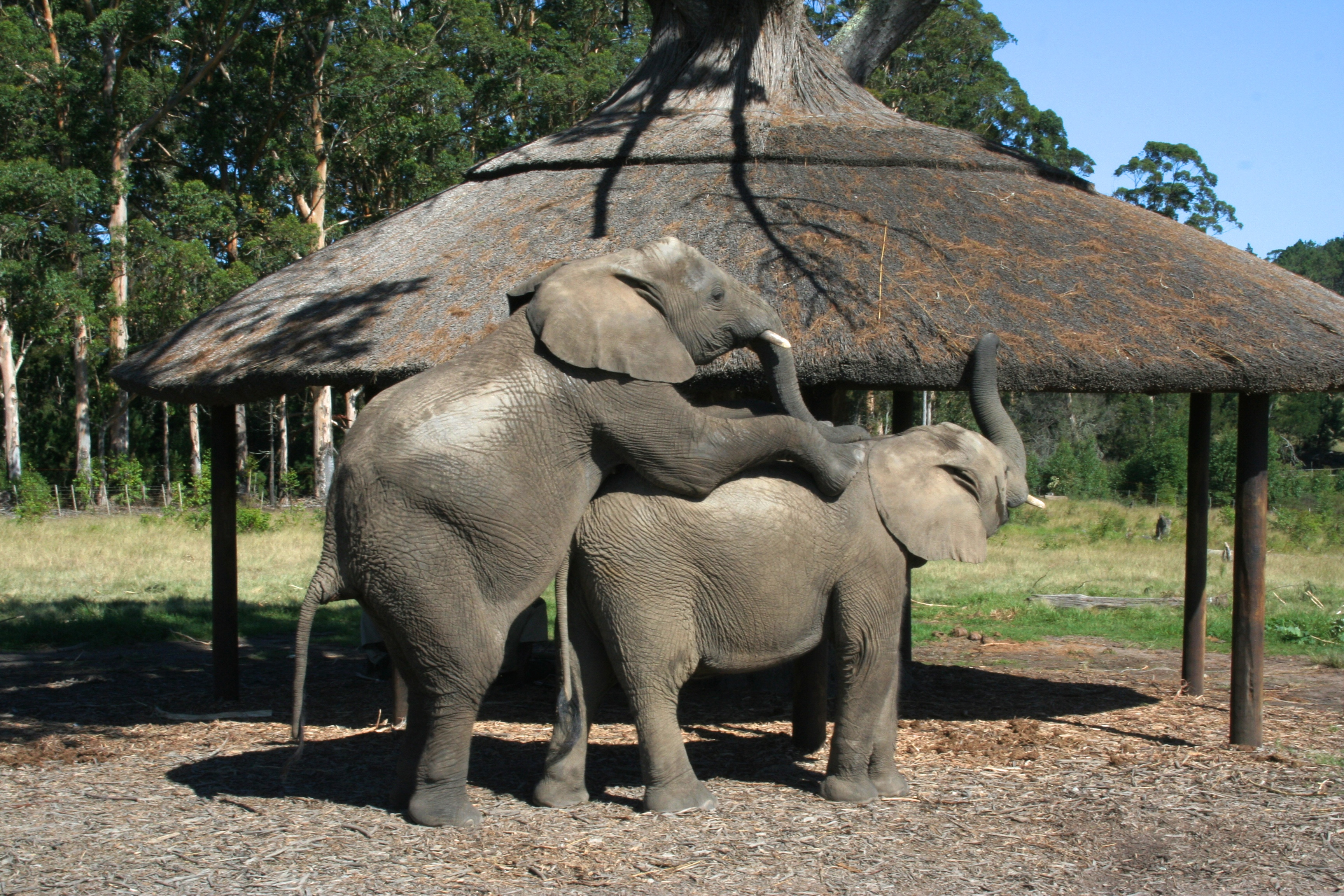 Elephant Style